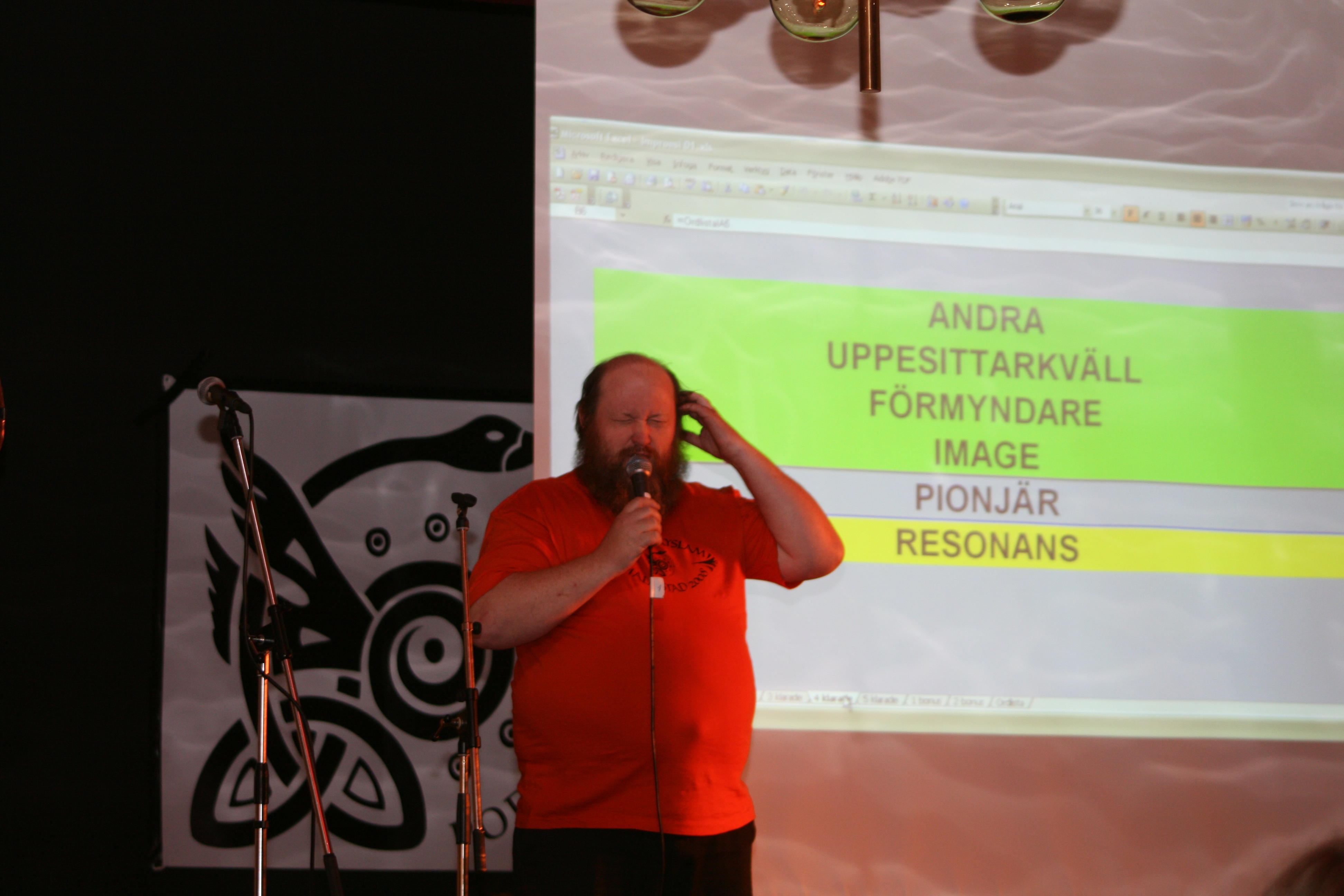 I improesi måste man hitta på själv. På en gång. Poetry Slam SM 2008 torsdag